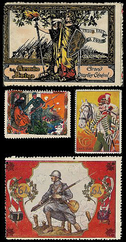 Пропагандистские виньетки Деландрэ времён Первой мировой войны.